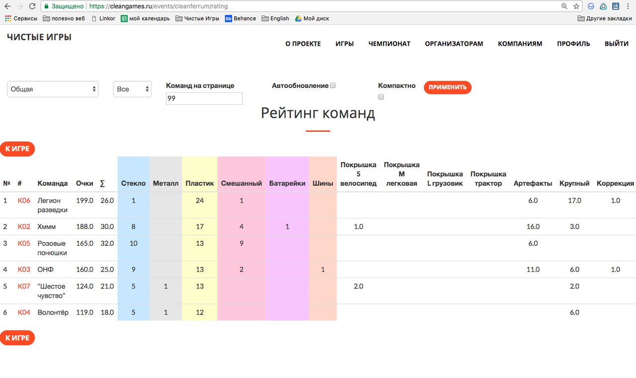 Функционал сайта Чистые Игры